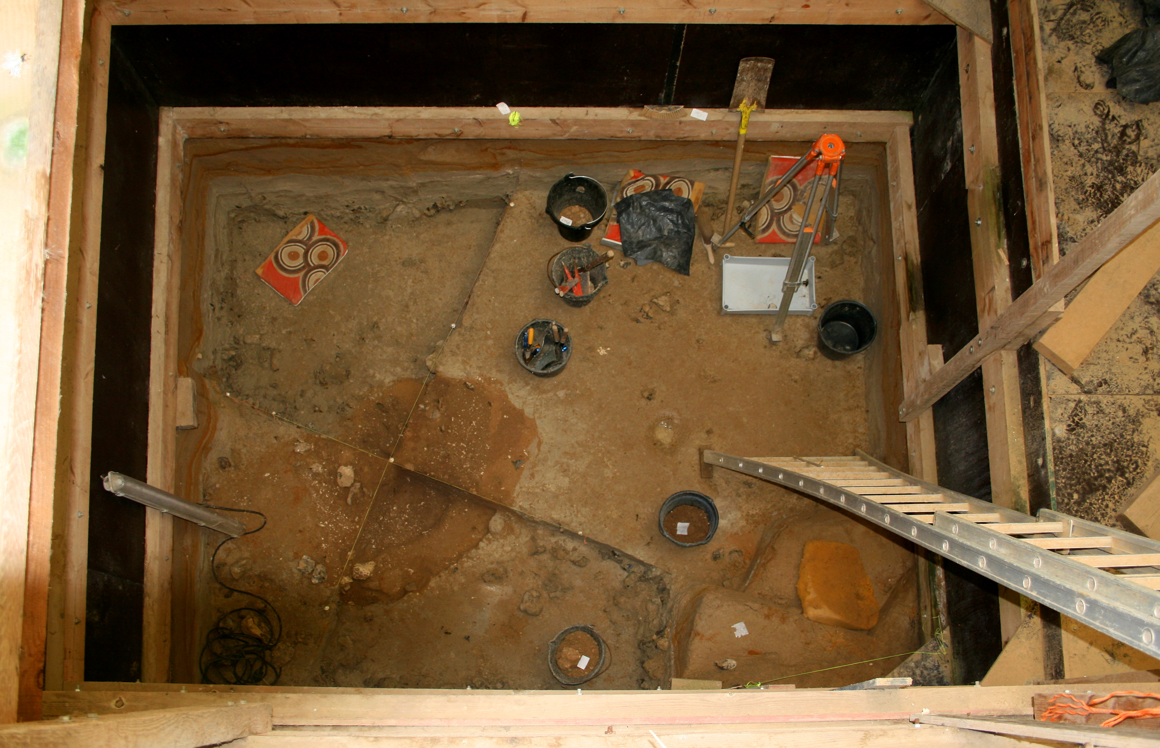 Spiennes (Belgique), fouilles arcchéologique dans les minières néolithiques de silex du "Camp à Caillaux"